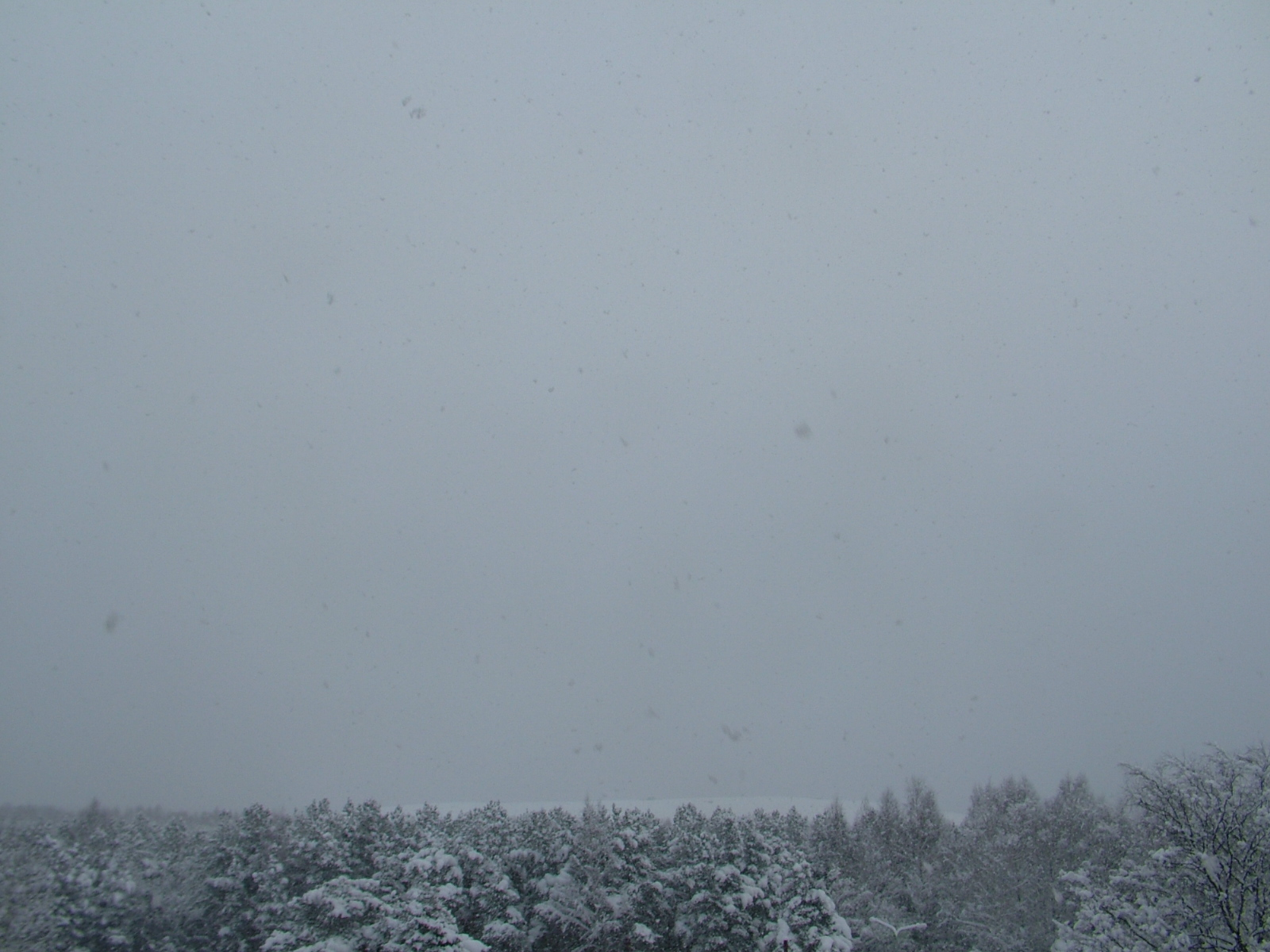 Kihtsajupilved põhjustamas lauslund Tallinnas, 27.11.2010. a.